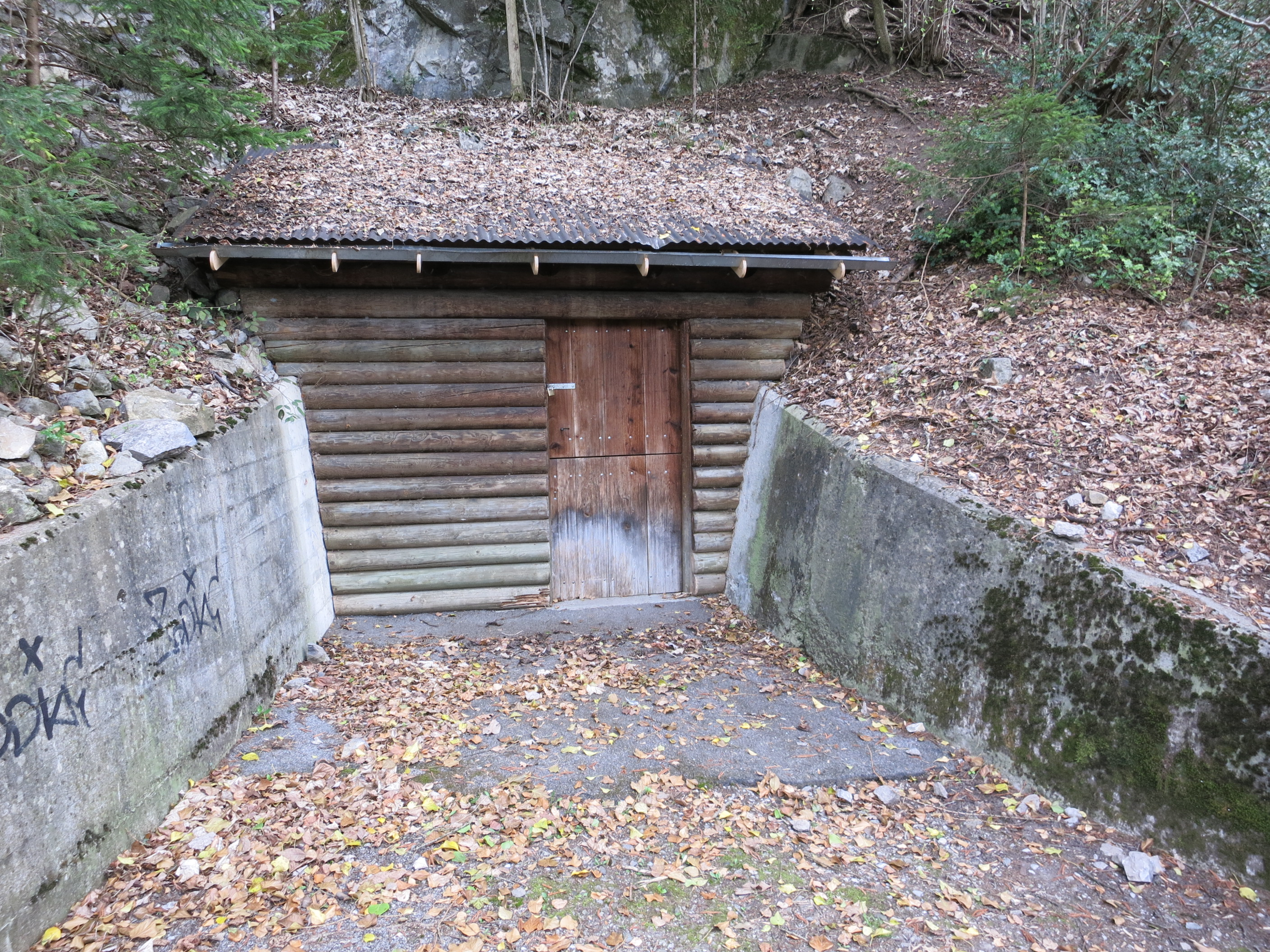 Kommandoposten, Unterseen BE, Schweiz